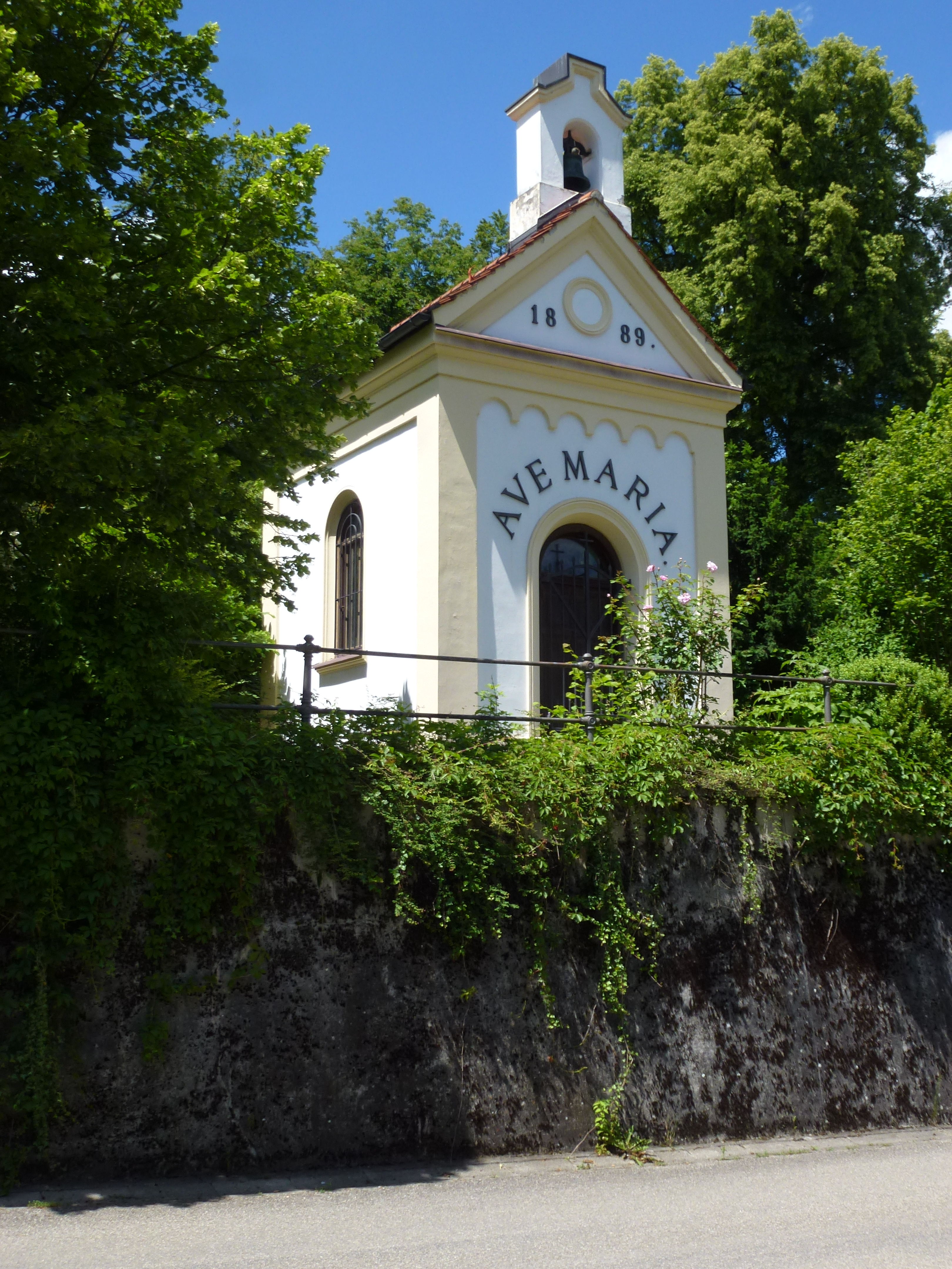 Schondorf, Ecke Seestraße / Kapellenberg. Die Kapelle wurde 1889 erbaut von Karoline Dreyer, deren Tochter Franziska sie dann dem Dritten Orden in München schenkte (Gedenktafeln in der Kapelle). Auf der Kapelle befindet sich über dem Eingang ein nach 2 Seiten offenes Glockentürmchen mit einer Glocke aus dem Jahr 1890